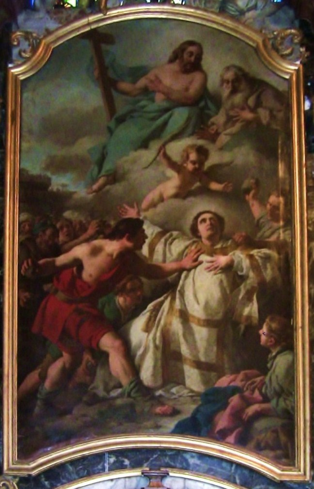 Tableau du Martyre de Saint-Etienne.